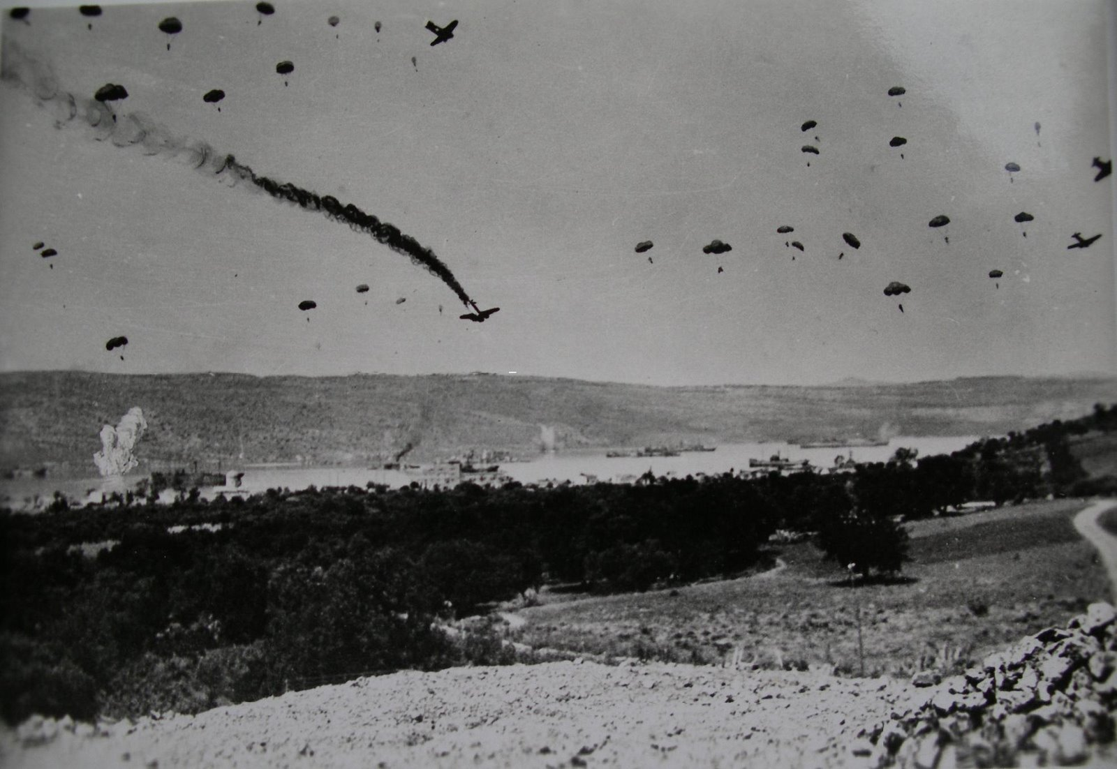 Ataque de paracaidistas alemanes sobre los aeródromos de Ypenburg, Ockenburg y Valkenburg